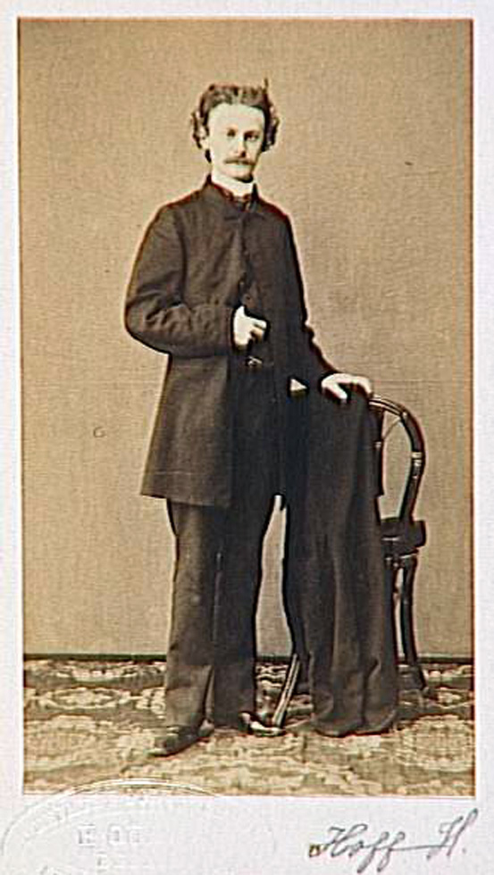 Fotografie von Karl Heinrich Hoff (1838–1890), Arnold Overbeck, Gebr. G. & A. Overbeck in Düsseldorf